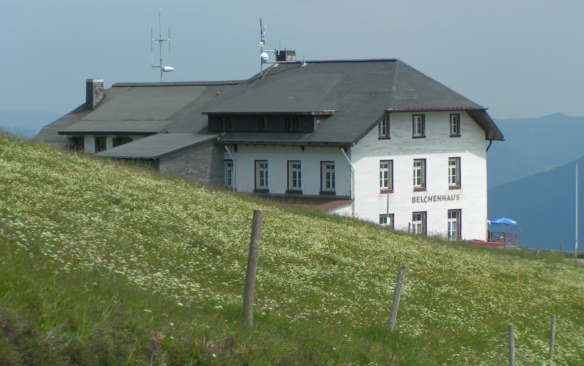 Belchenhaus neben der Bergstation der Seilbahn auf den Belchen (Schwarzwald)